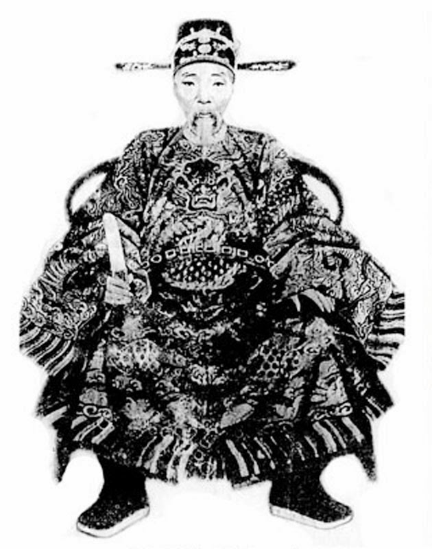 Thượng thư Bộ lễ Hoàng Hữu Xứng (1831 - 1905)